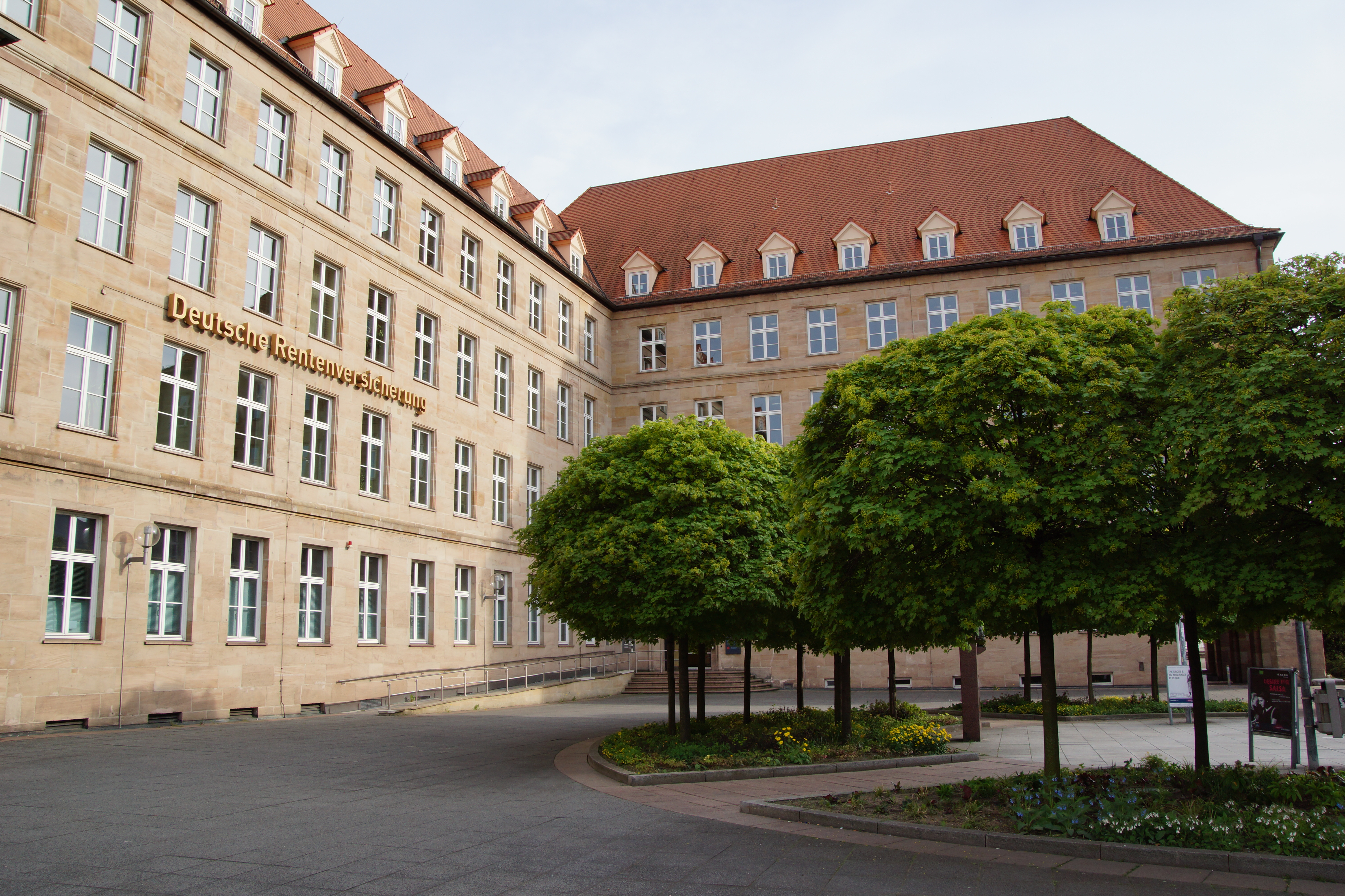 Das Sigmund-Schuckert-Haus gegenüber der Oper in Nürnberg